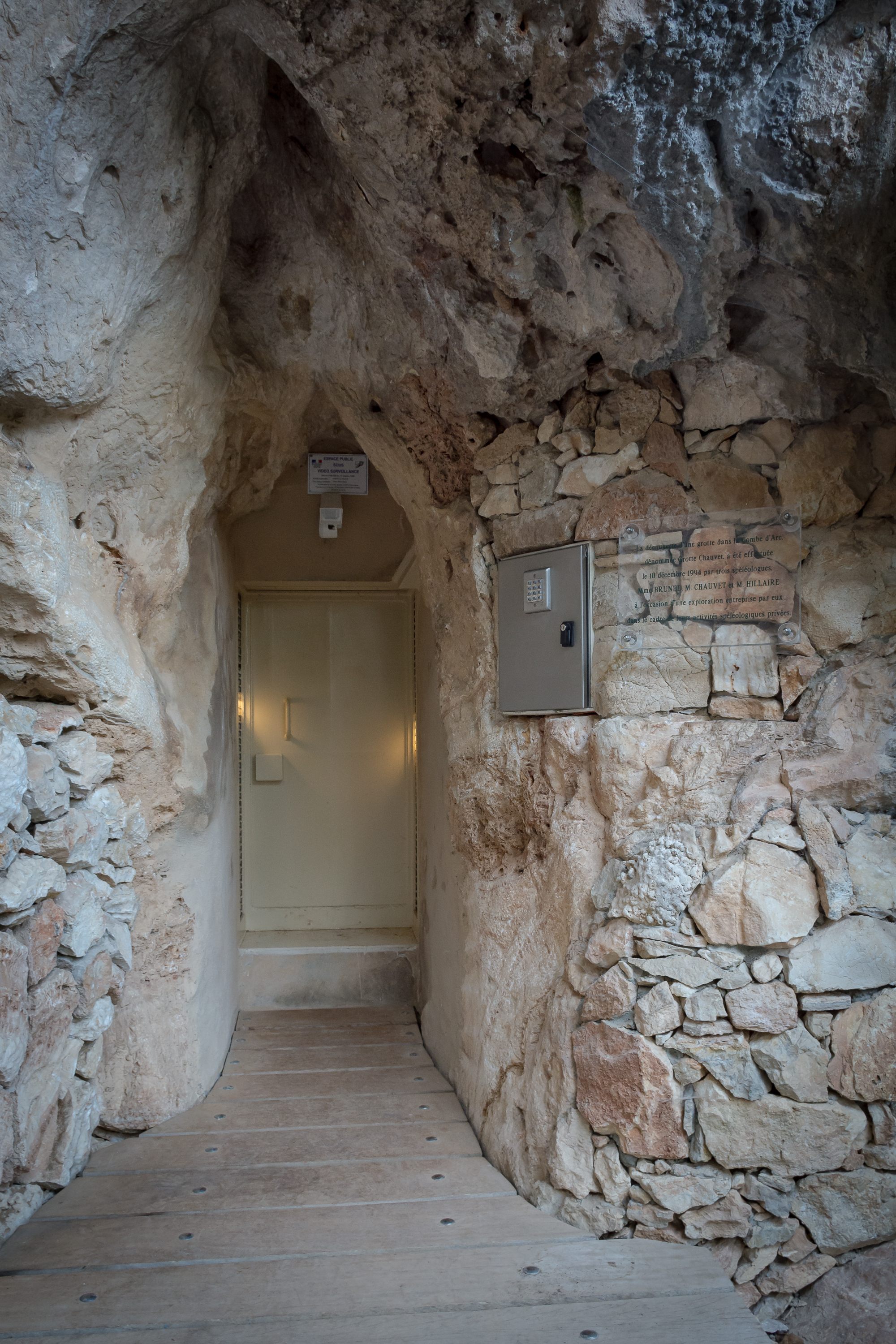 Eingang der Grotte Chauvet im Tal der Ardèche, Frankreich.